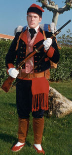 Uniforme de Gala dels Voluntaris Catalans